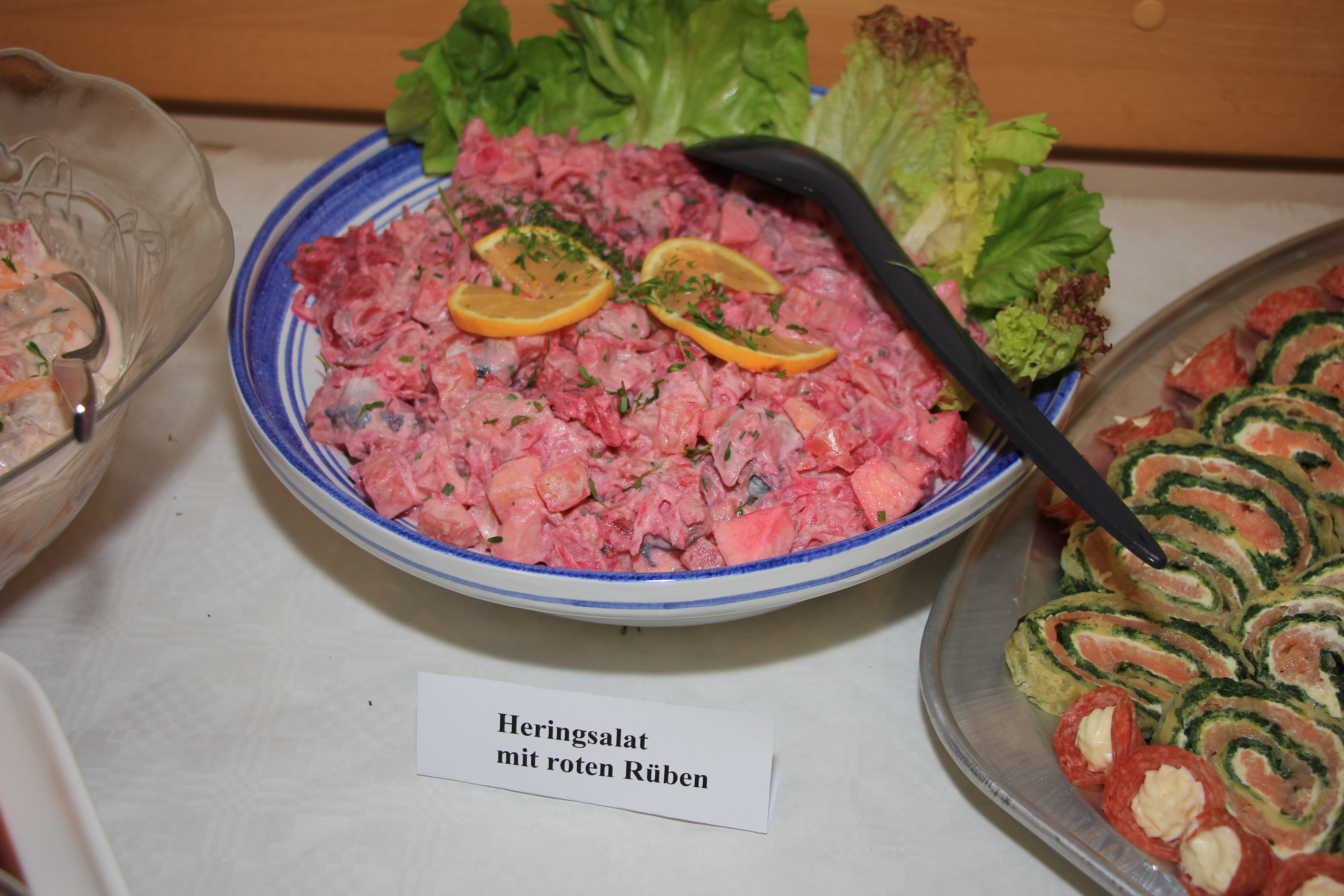 Heringsalat mit roten Rüben bei einem Büffet beim Heringsschmaus